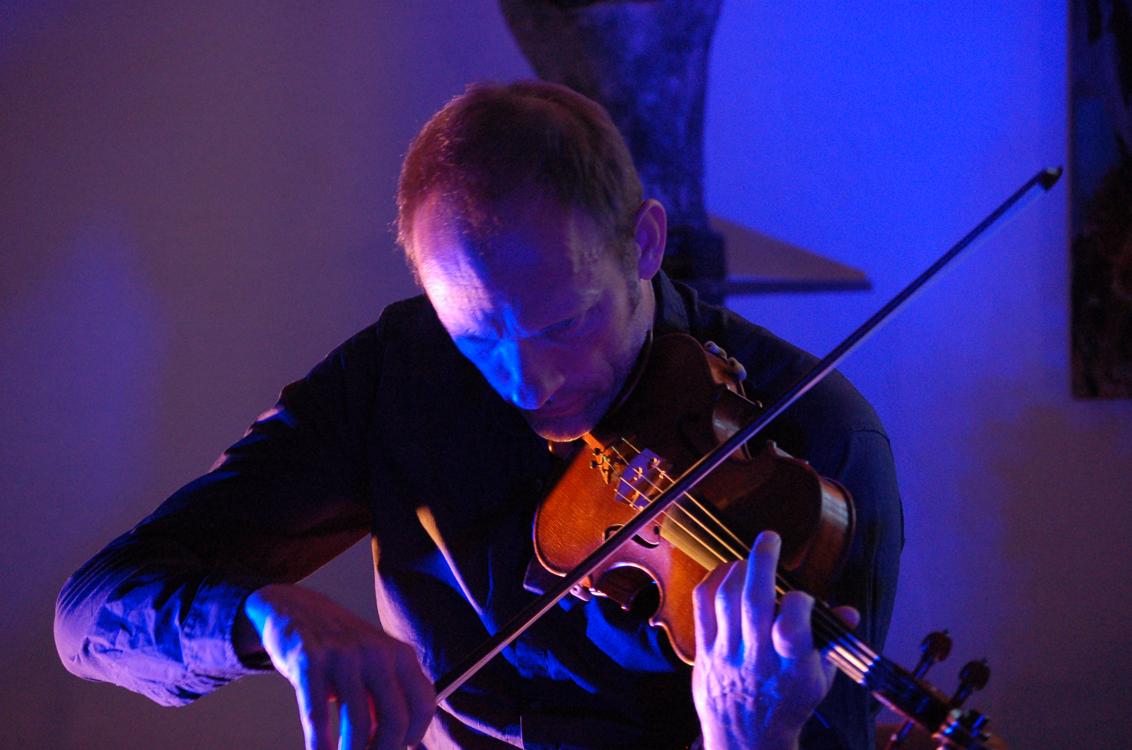 Albrecht Maurer im "Kulturknastfenster" in Brüel; Mecklenburg-Vorpommern; 2011